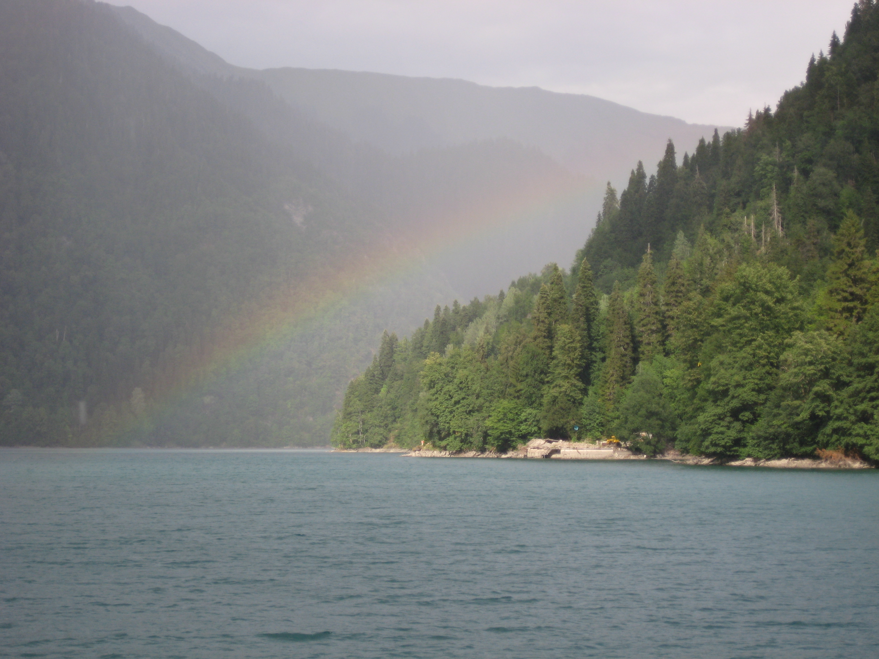 Абхазия,озеро Рица